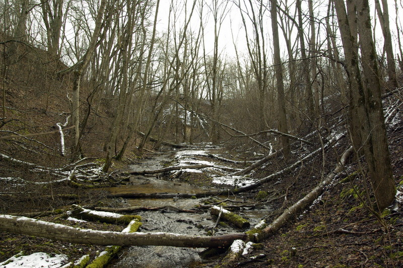 Orasoja kanjon